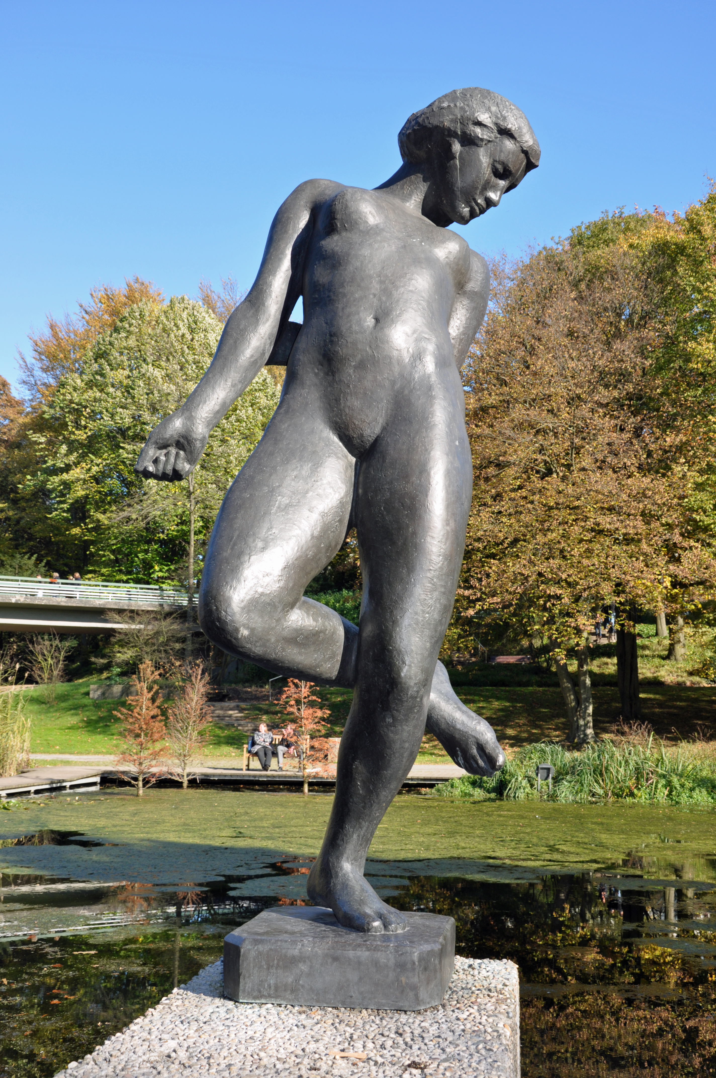 Skulptur in der Gruga, Essen. von Georg Kolbe, 1914.